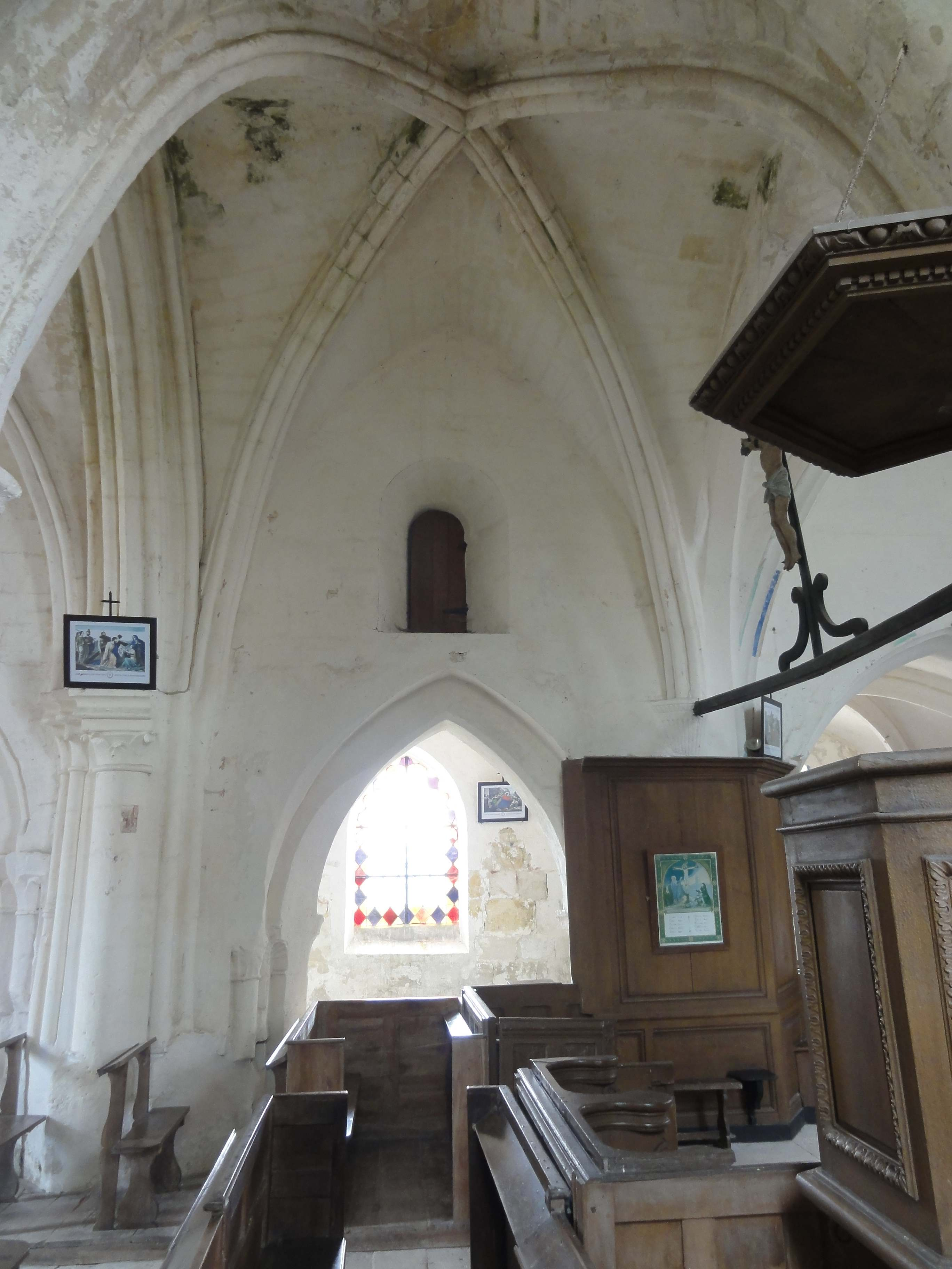 Intérieur de l'église (voir titre).